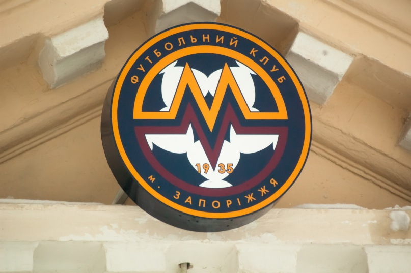 Эмблема ФК Металлург (Запорожье)